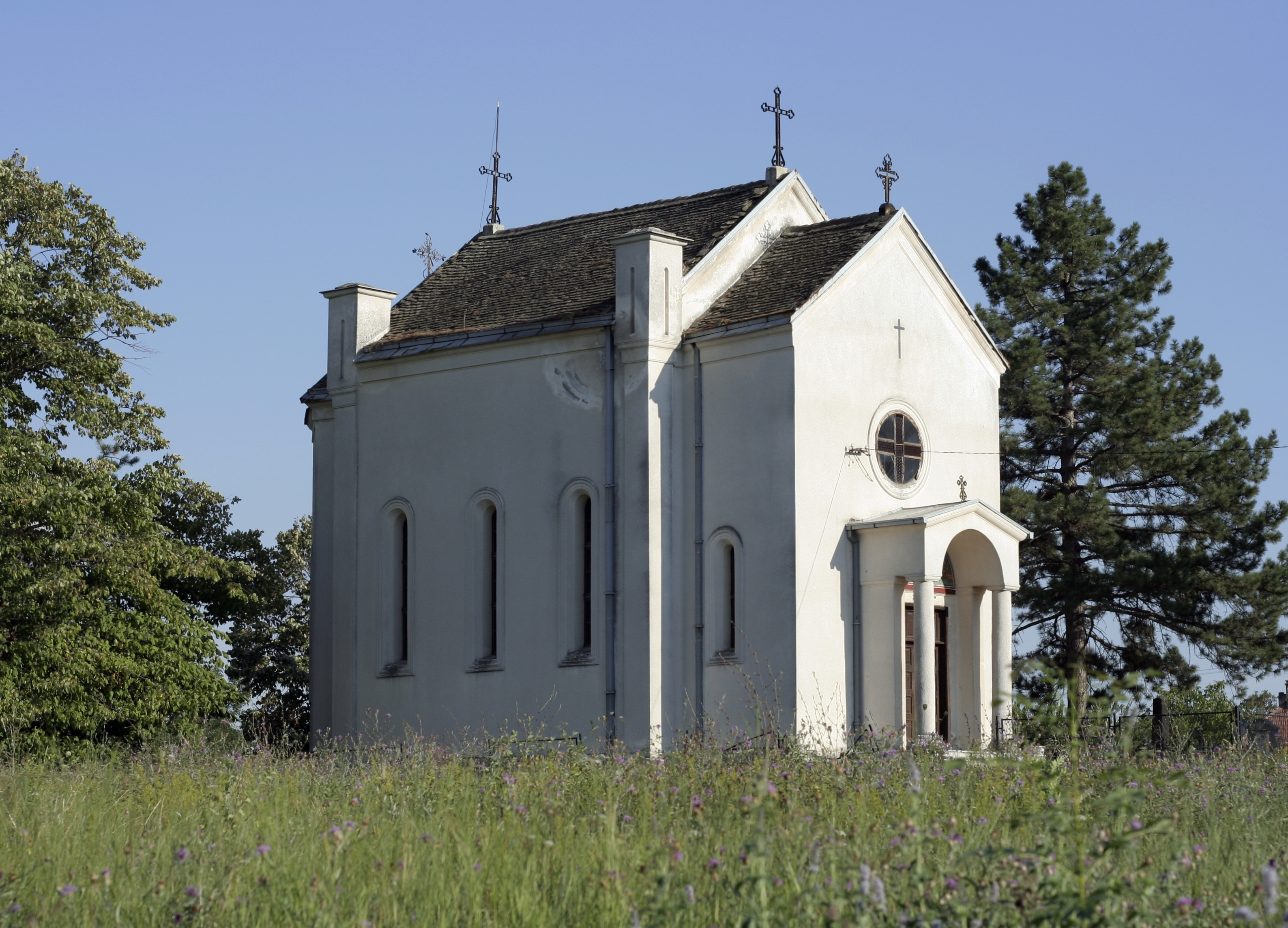 Црквa Св. Вазнесења у Дрену